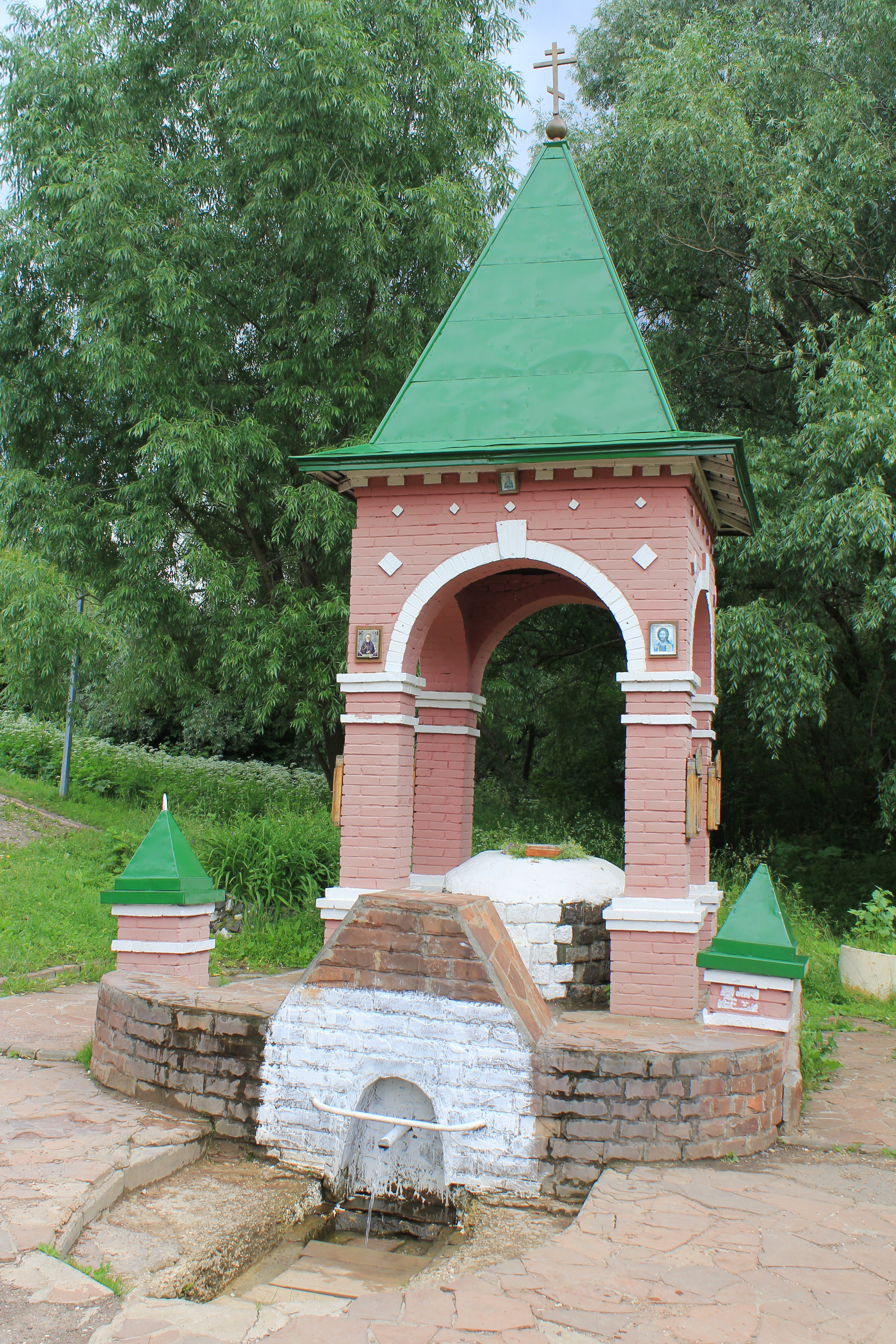 Родник Холодный в истоках Кукринского ручья в Коньково